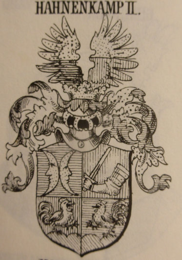 Wappen der Herren von Hahnenkamp